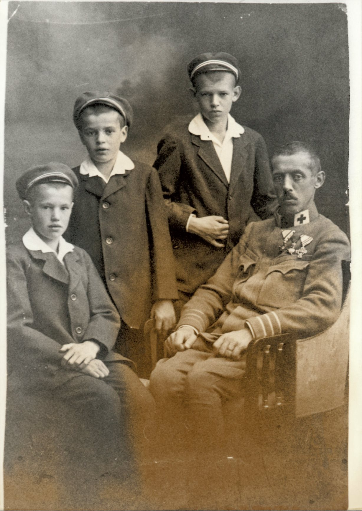 Viktor Kleiner, Landesarchivar von Vorarlberg, in Rot-Kreuz-Uniform anlässlich der Verleihung des Ritterkreuzes des Franz-Josephs-Ordens mit Kriegsdekoration 1918 mit seinen drei ältesten Söhnen. Links Karl Kleiner, später Generalabt der Zisterzienser.